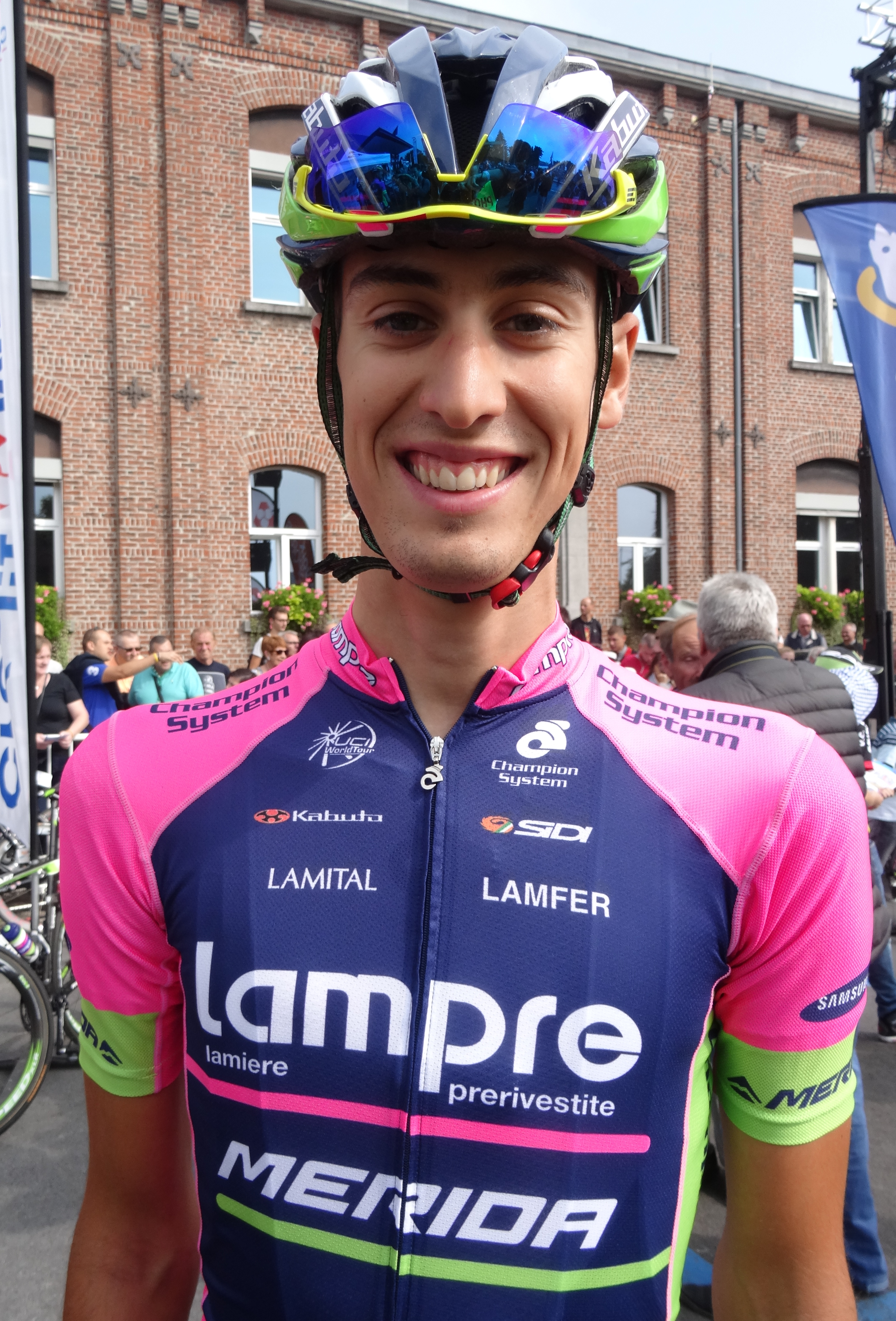 Reportage photographique réalisé le dimanche 7 septembre à l'occasion du départ et de l'arrivée du Grand Prix de Fourmies 2014 à Fourmies, Nord-Pas-de-Calais, France.